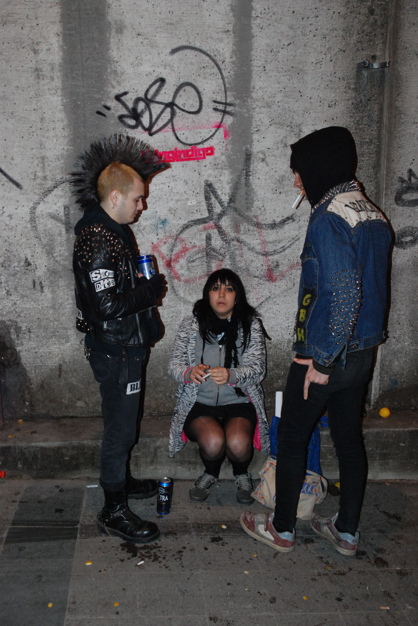 Owner Tegiiin